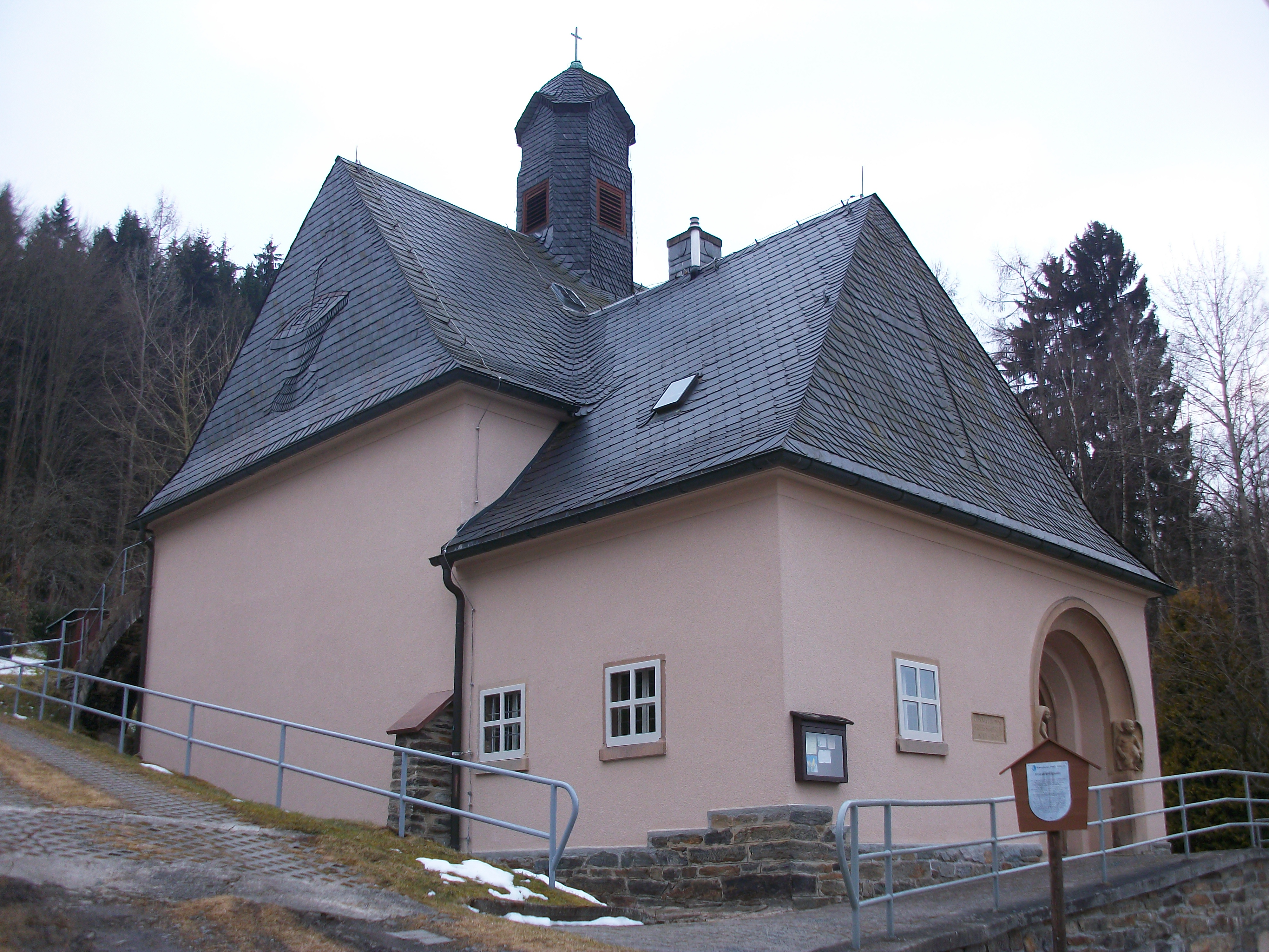 Friedenskapelle Thermalbad Wiesenbad, Frontansicht